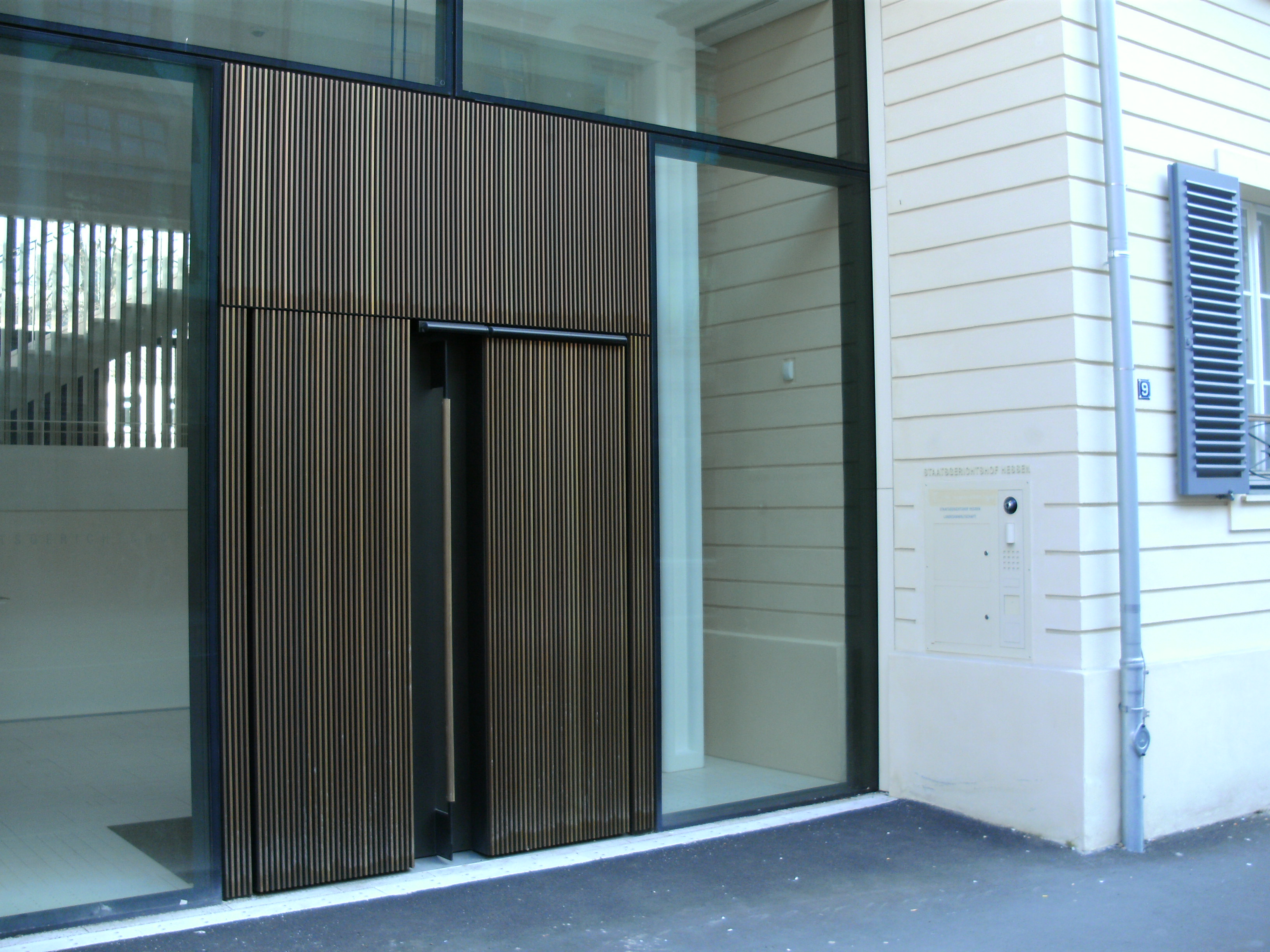 Hessischer Staatsgerichtshof, Luisenstraße, Wiesbaden